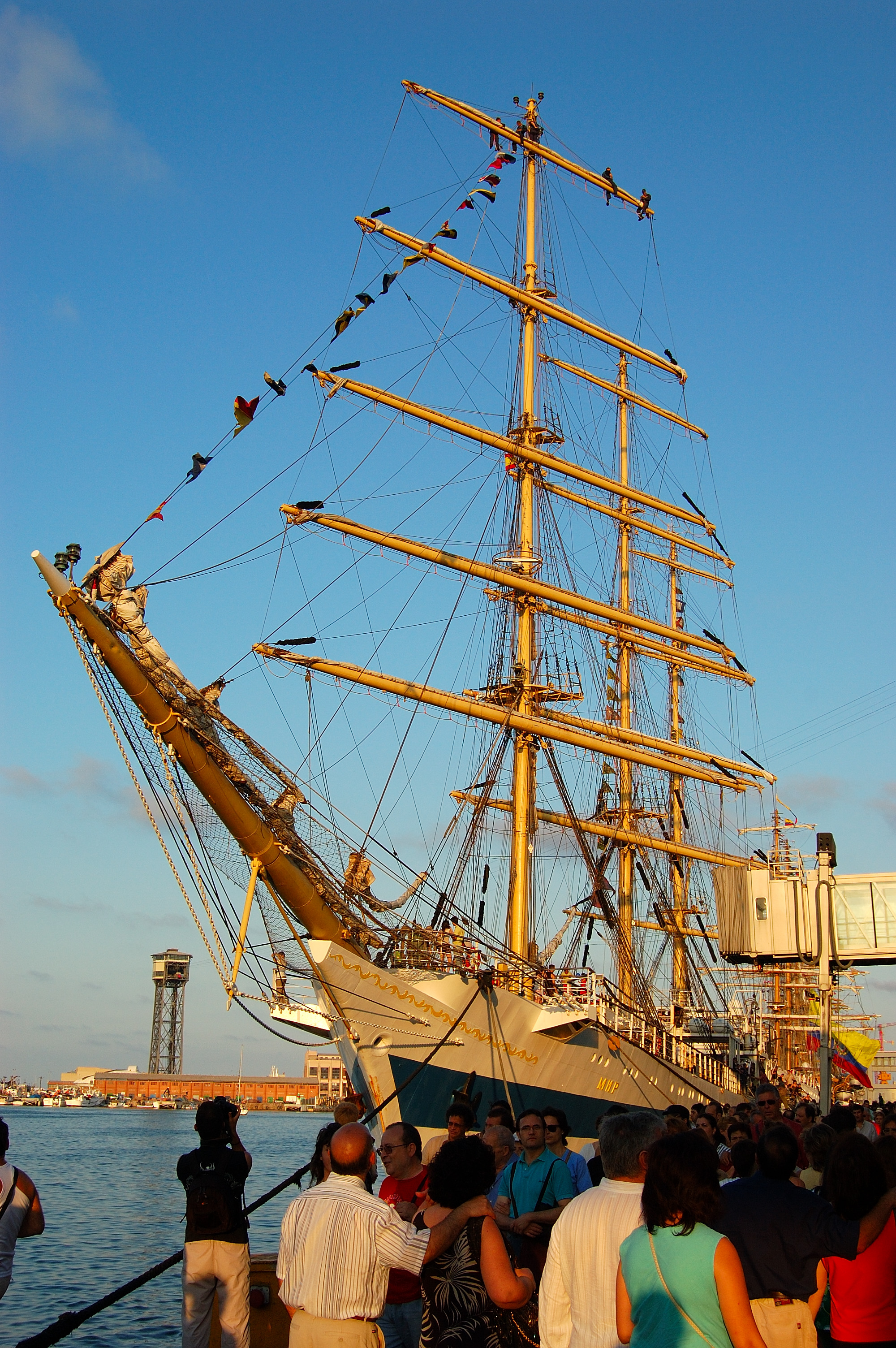 En lo alto del trinquete